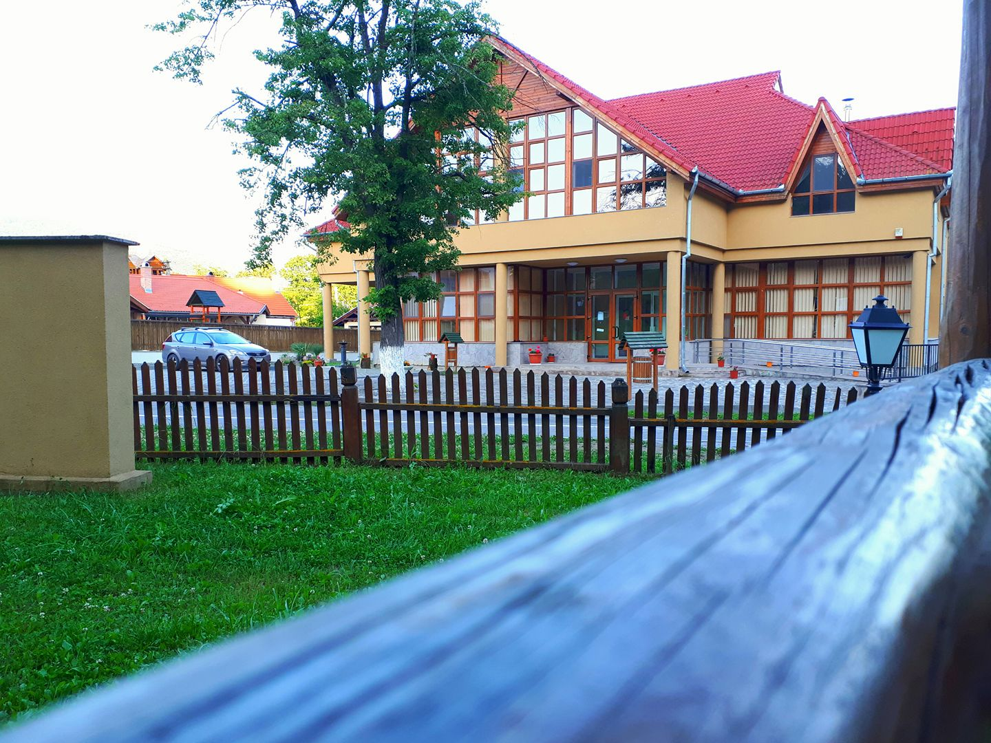 Málnásfürdö Kezelöközpont